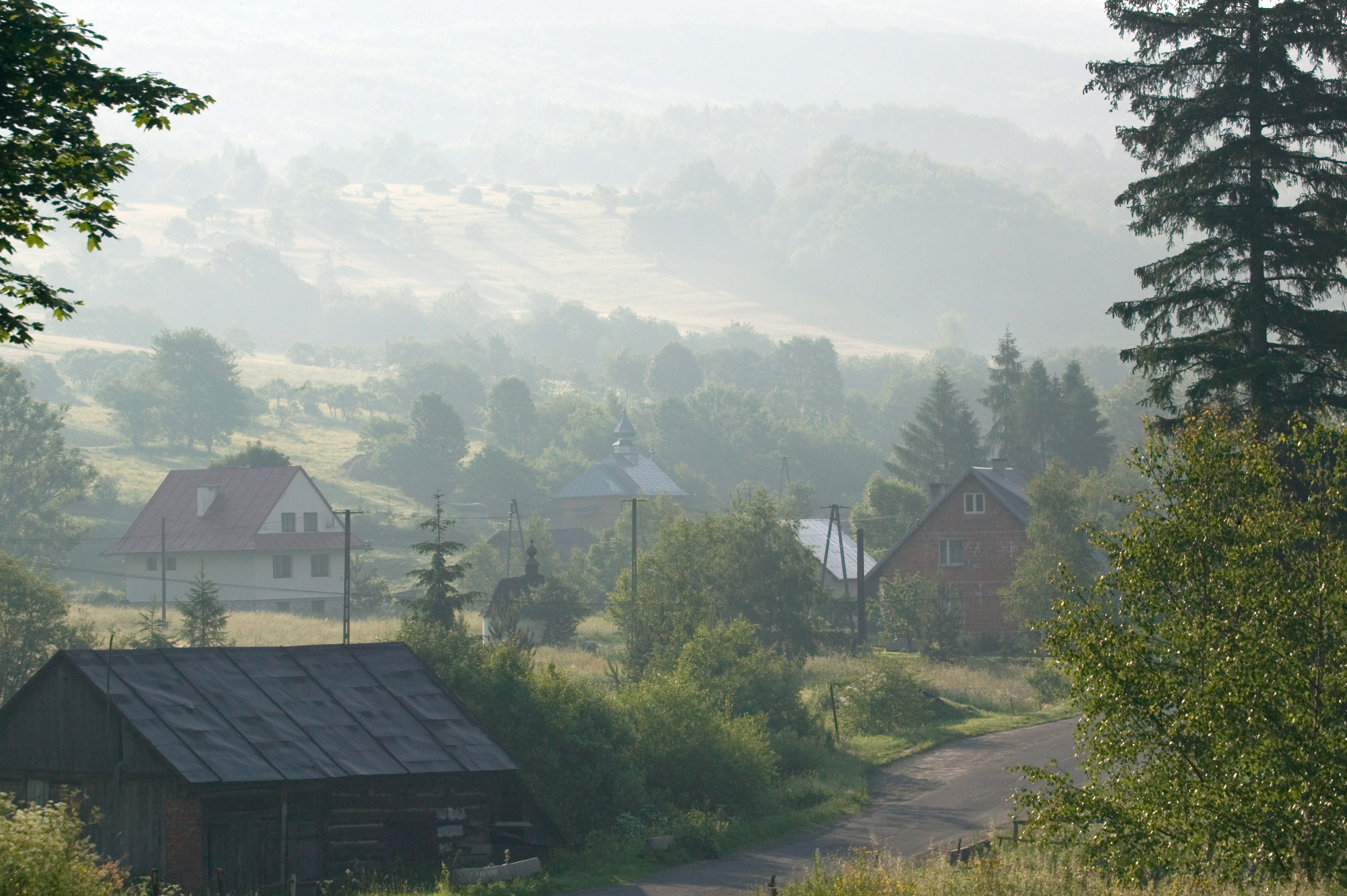 Wieś Bodaki o poranku